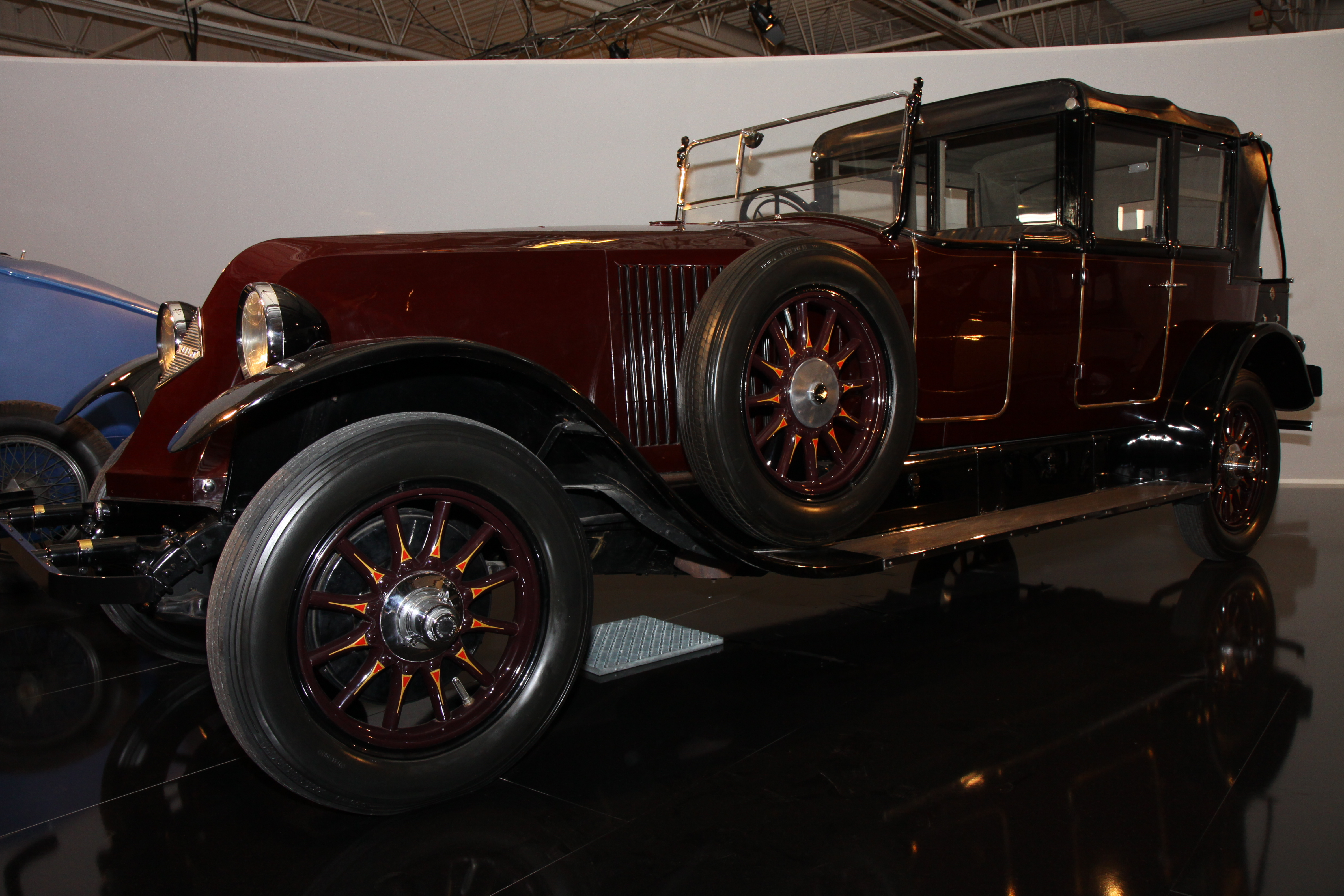 Paris - Mondial de l'automobile 2010